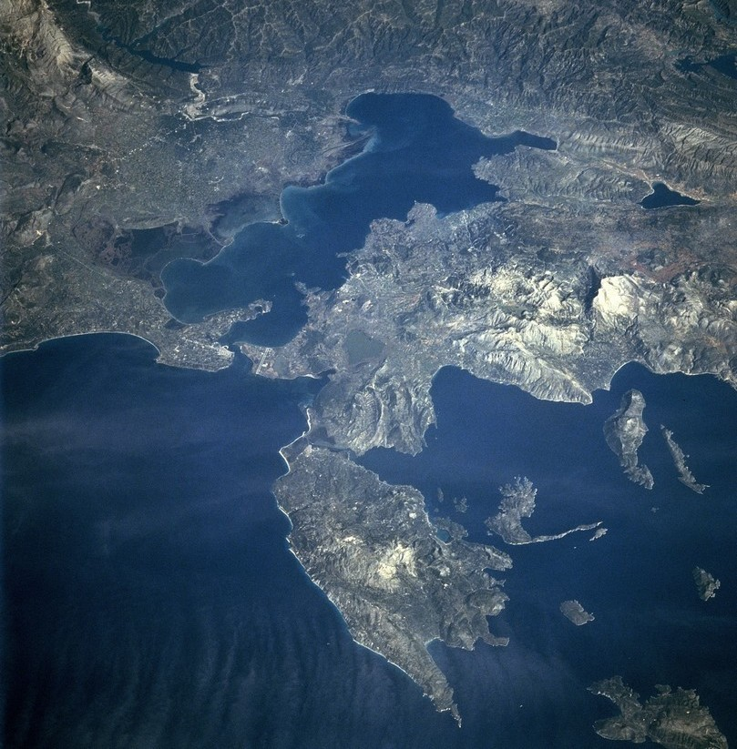 Depuis File:EFS highres STS066 STS066-101-39.JPG